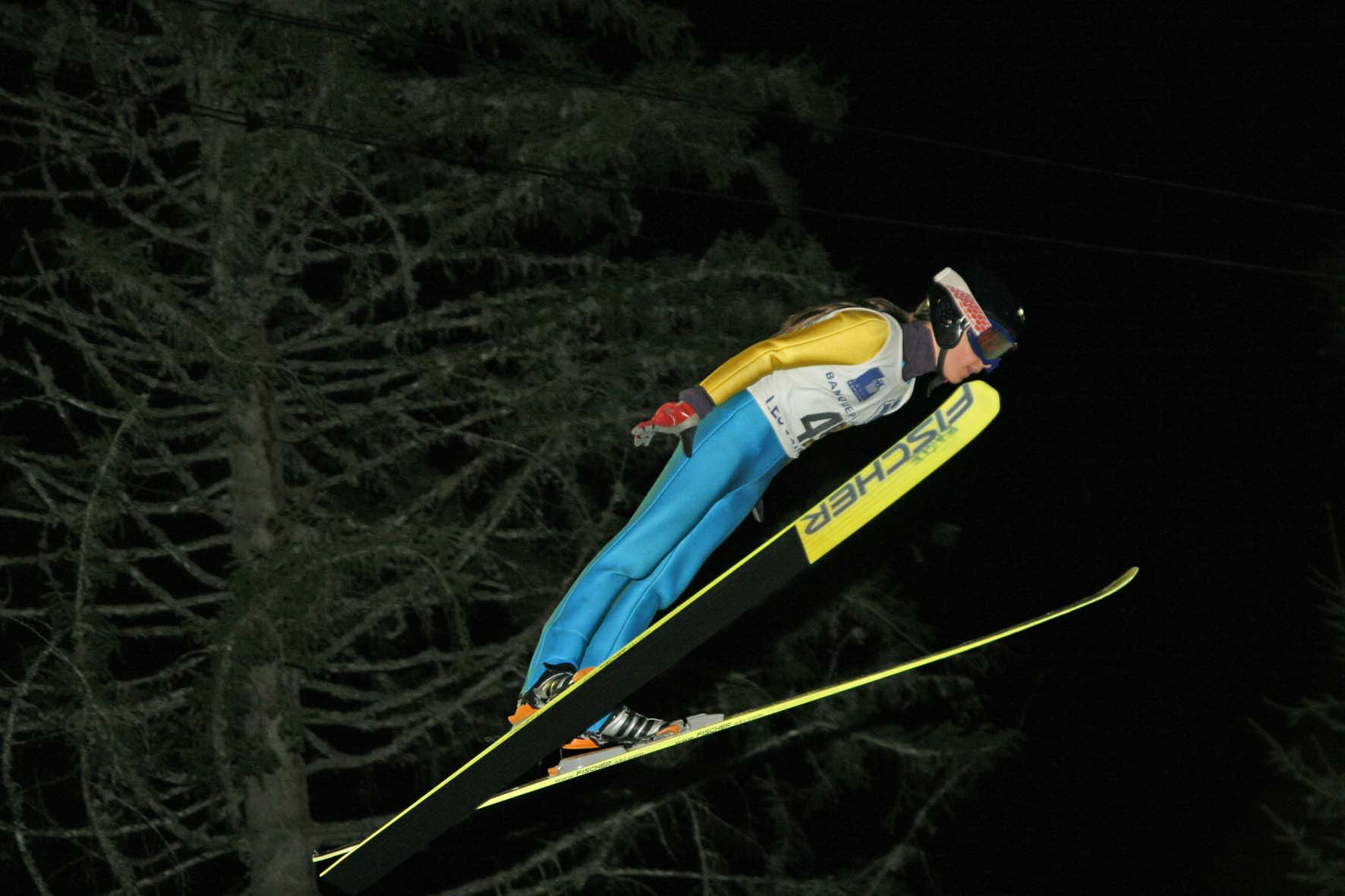 Coline Mattel à l'occasion d'un concours local aux Contamines-Montjoie.